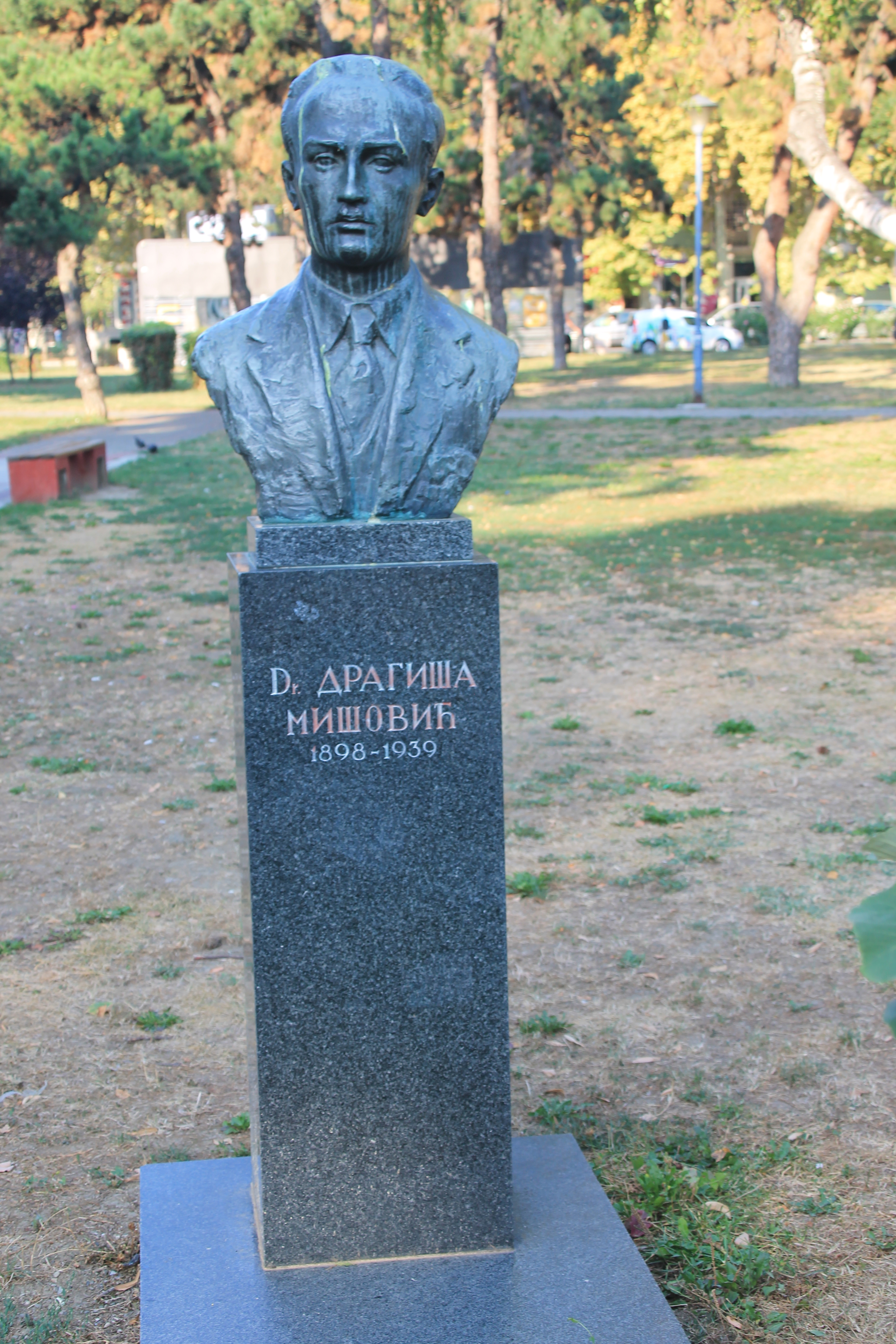 Spomen bista Dr Dragiše Mišovića